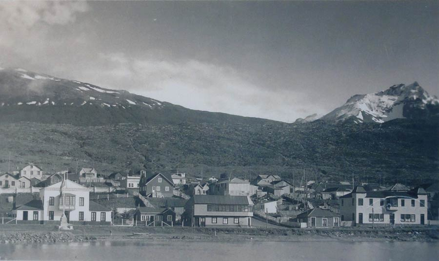 Ushuaia